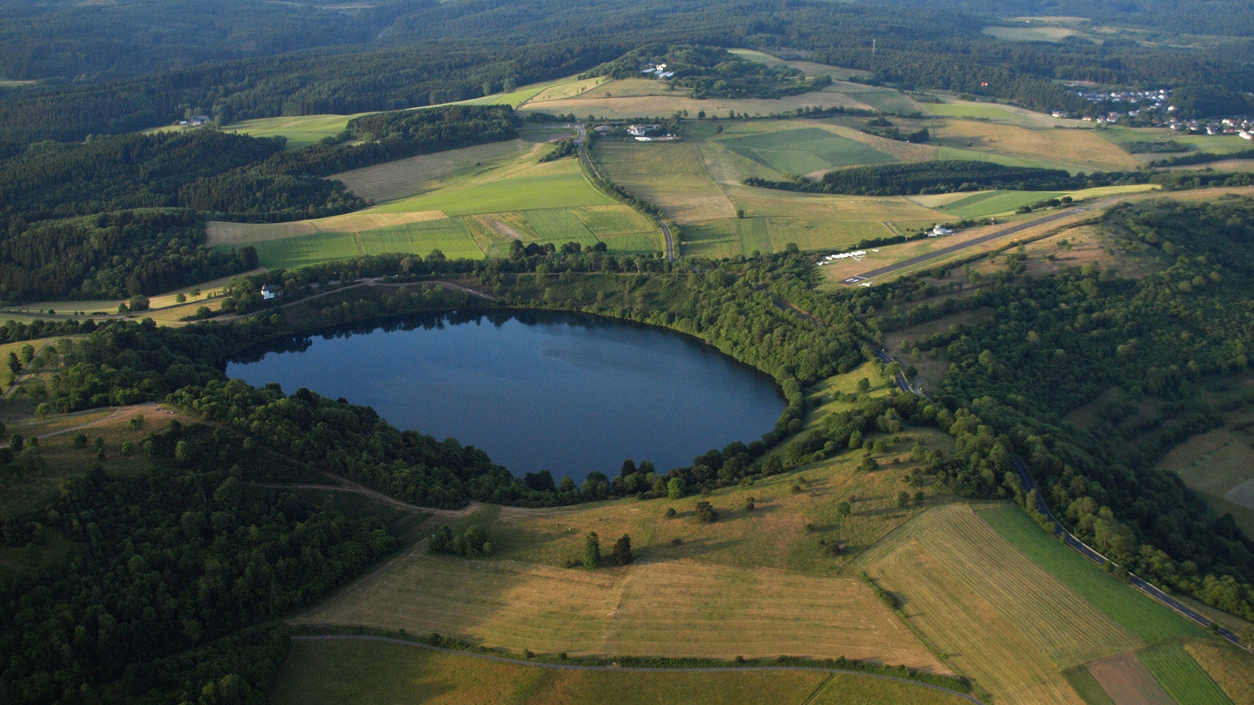 Dauner Maare, Weinfelder Maar oder Totenmaar, Luftaufnahme (2015)